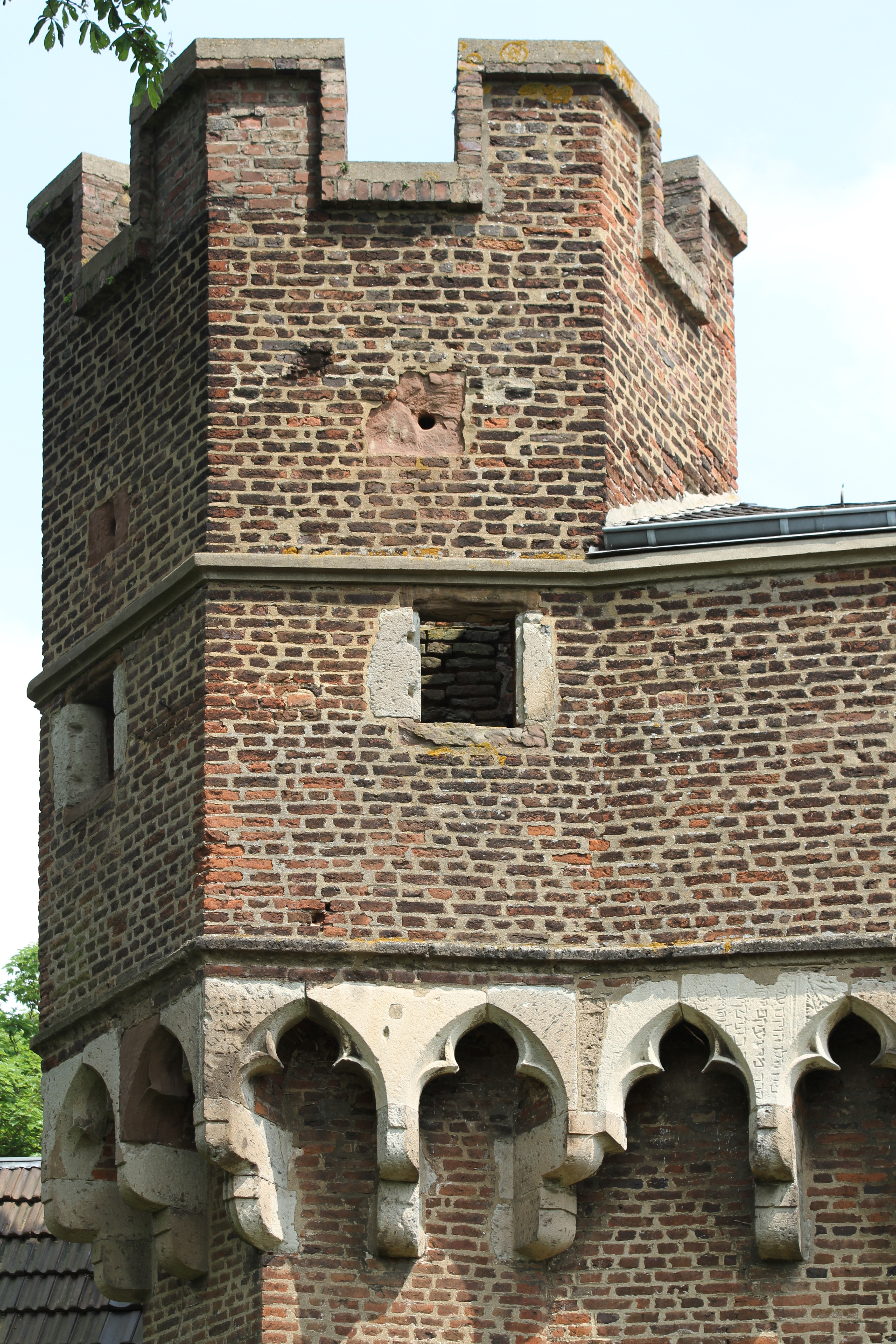 Mauerwerk und Bogenfries der Landesburg Lechenich (Detail)